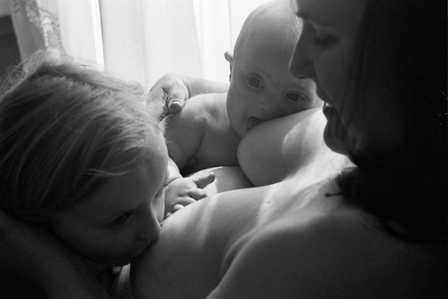 Lactancia materna en tándem a un niño con Síndrome de Down y una niña, y con embarazo